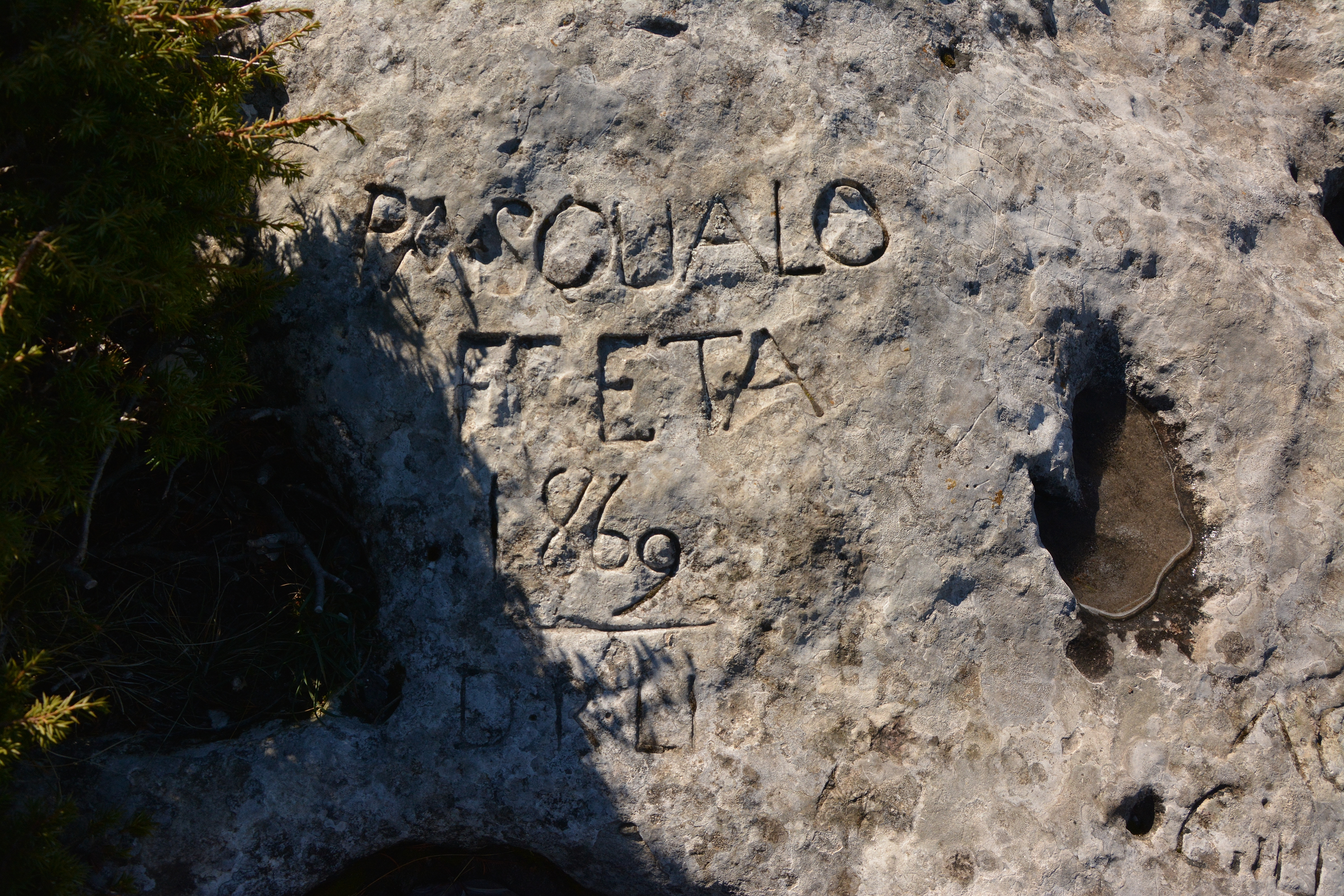 parco nazionale della Majella (Q1085735)